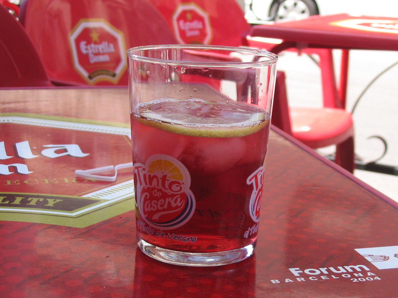 Dicen que hay vida más allá de la cerveza. Dicen...